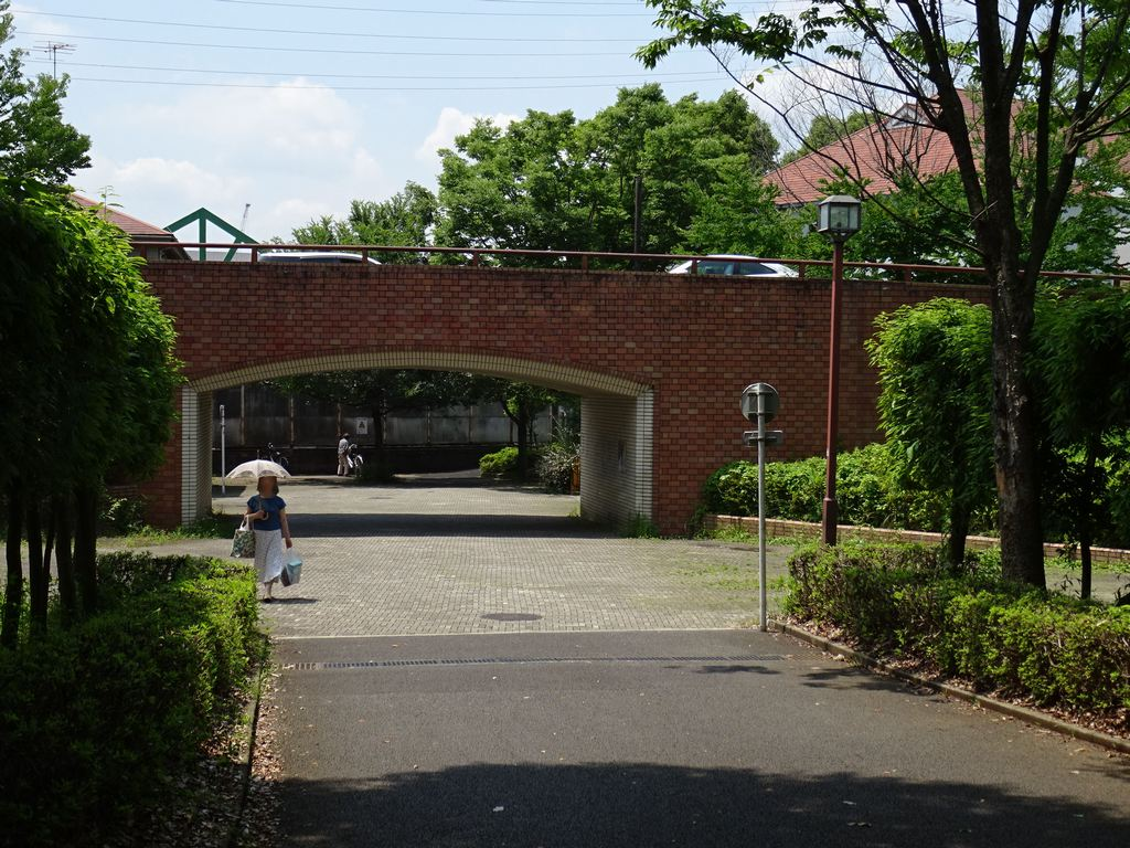 多摩ニュータウンの歩車分離（2015年6月24日撮影）